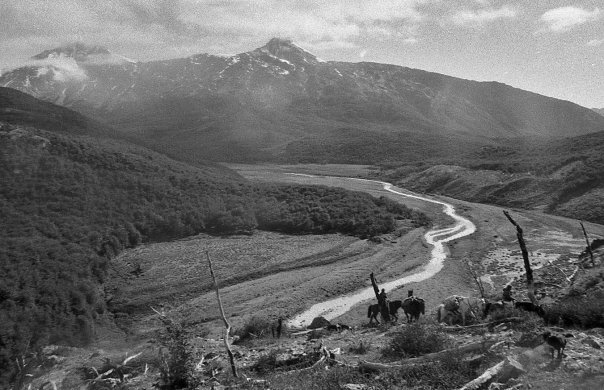 Vista de un valle en la región de Aysen hacia 1940.